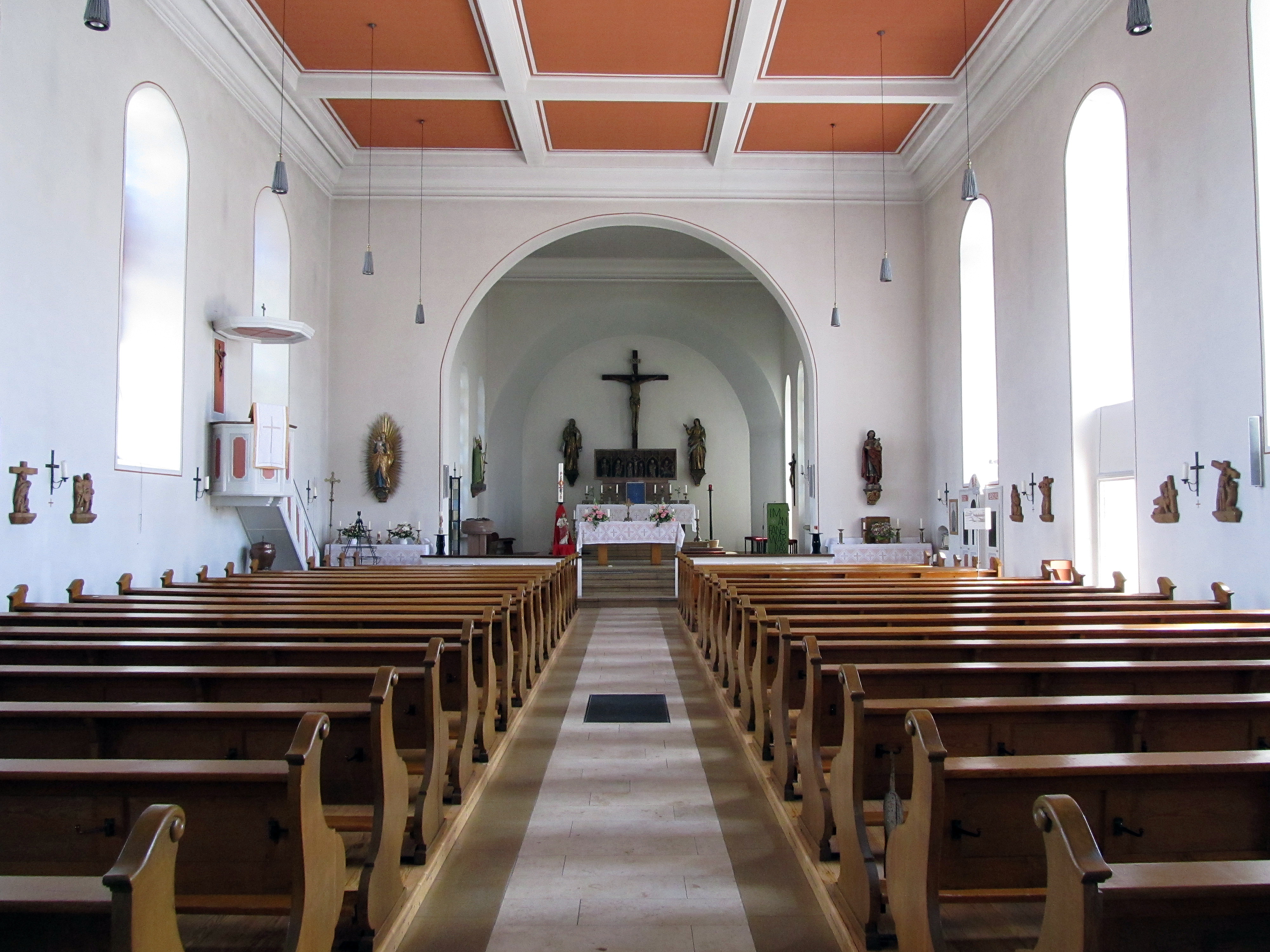 Blick ins Innere der katholischen Pfarrkirche St. Martin in Medelsheim, Saarland